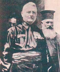 Il prefetto Cesare Mori in camicia nera presso Piana degli Albanesi, comunità albanese di Sicilia di rito bizantino (vedasi papàs alle spalle).